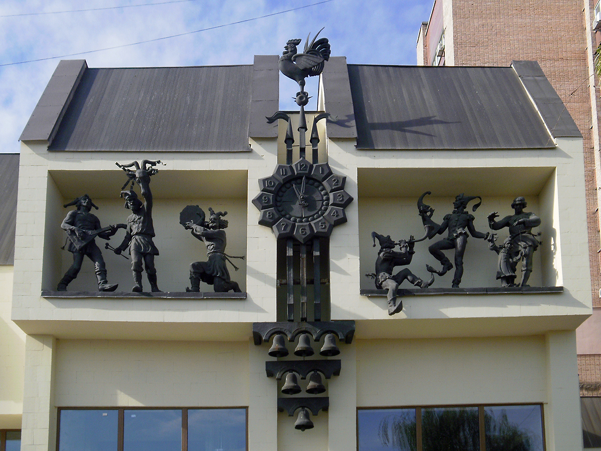 Description RU: Часы на Кукольном театре. Луганск. Украина Date: 11/10/2012 Author: Artemco License: GFDL